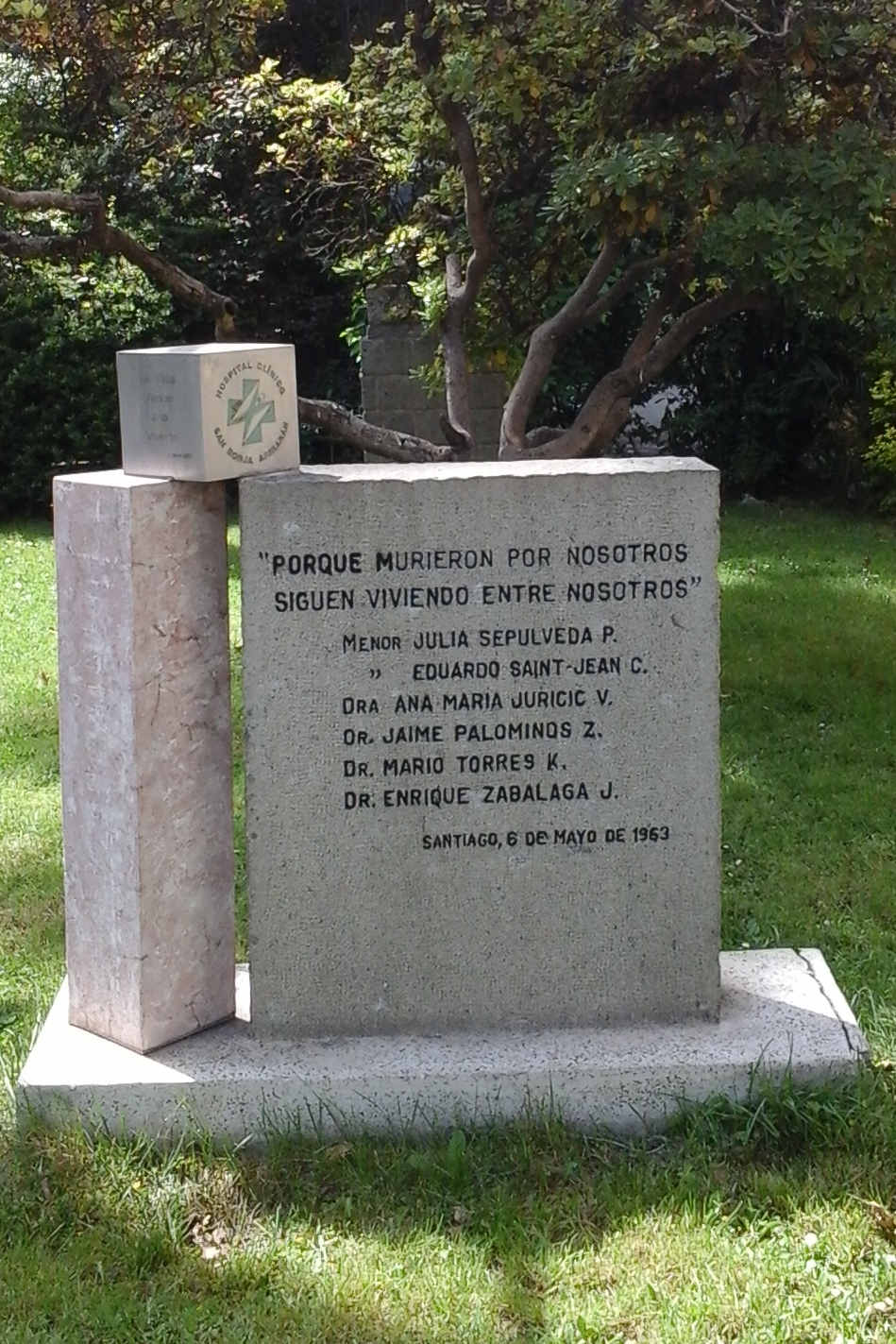 Monumento en recuerdo a las víctimas de la tragedia en el Hospital Manuel Arriarán en Mayo de 1963